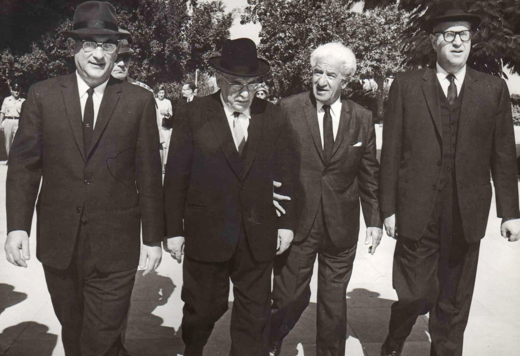 ביקור של הנשיא זלמן שז"ר במכון וייצמן. בתמונה: שזר במרכז, אבא אבן ראשון מימין, יצחק כץ ראשון משמאל, מאיר וייסגל ממכון וייצמן שני משמאל